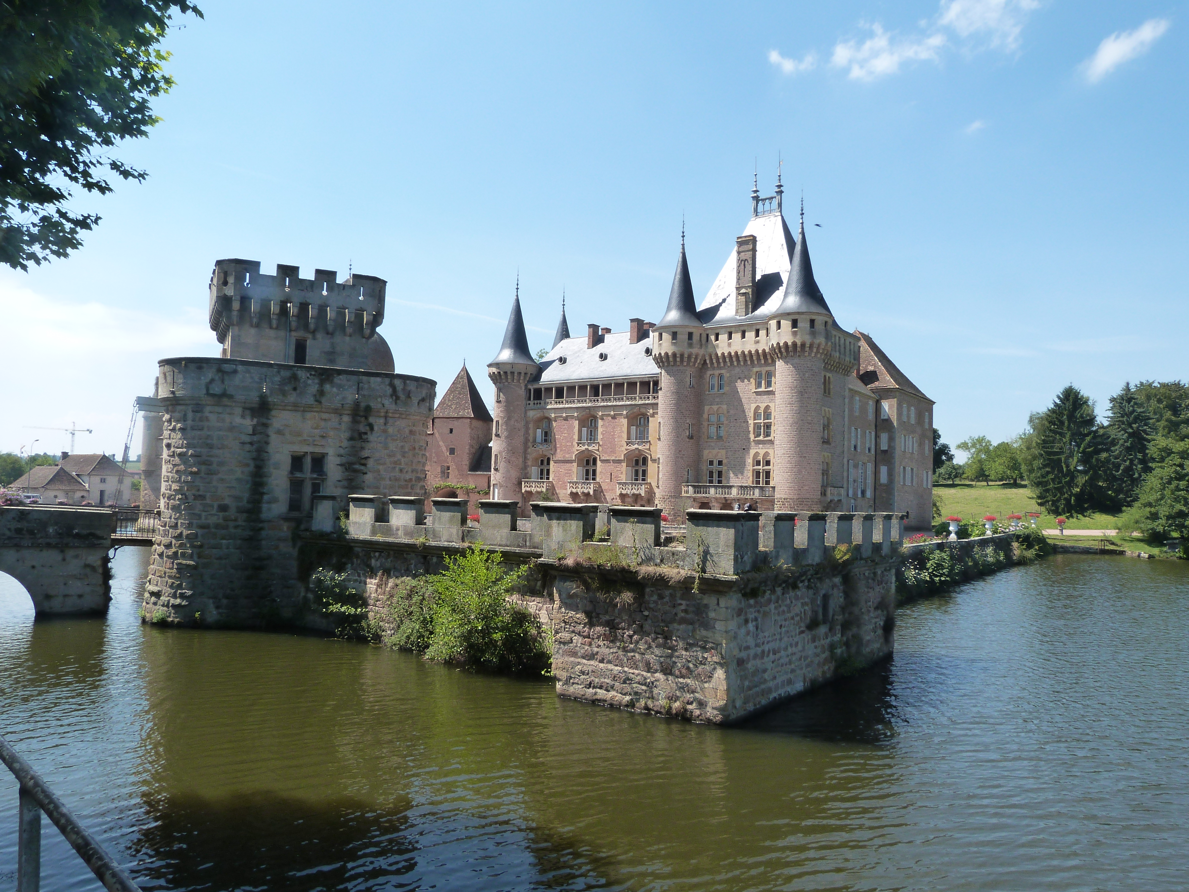 Château de la Clayette